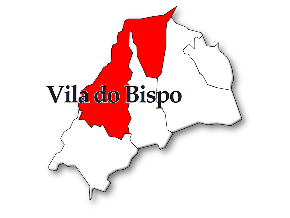 Censos 1864/2011